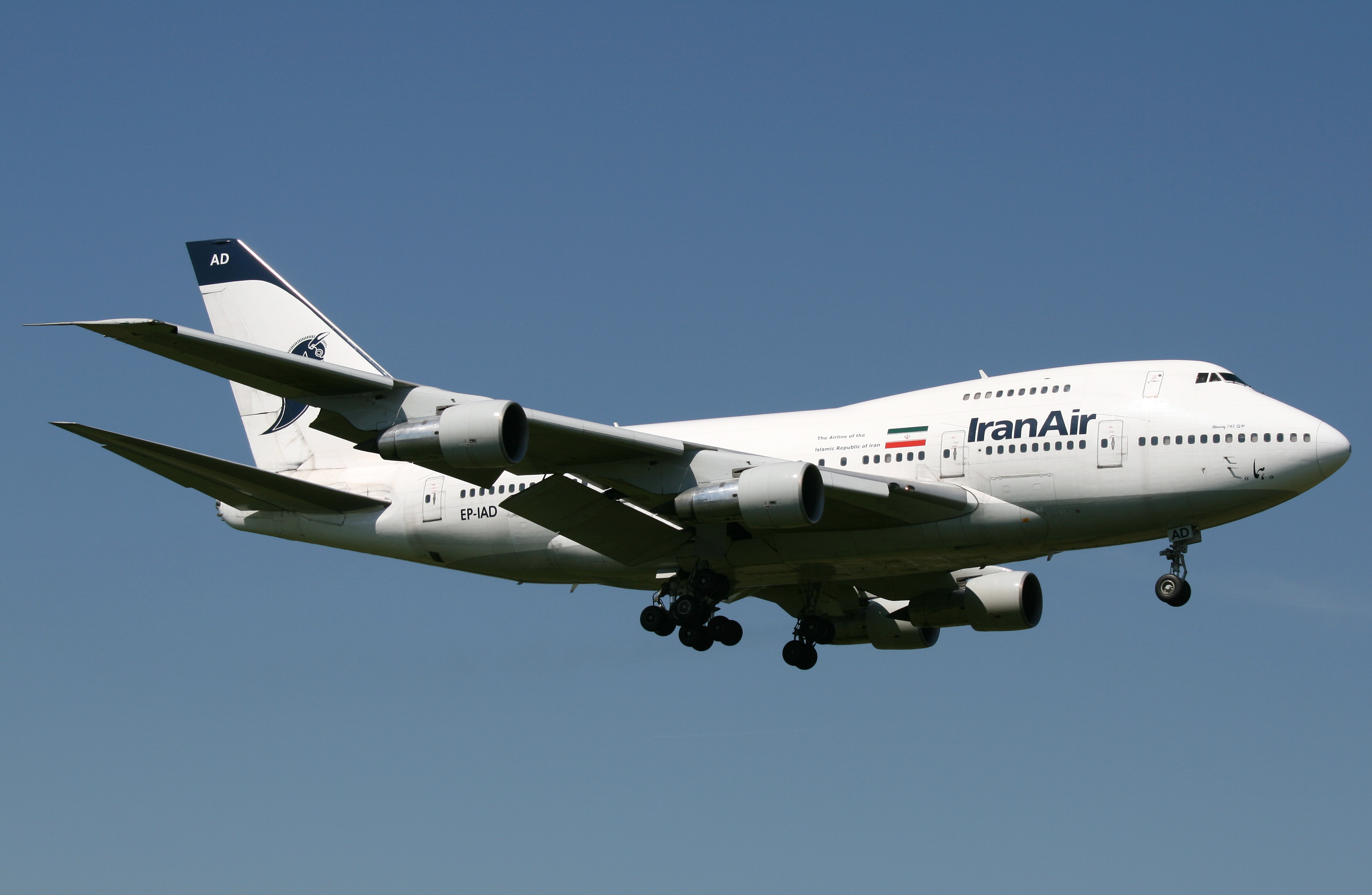 Ham / Eddh